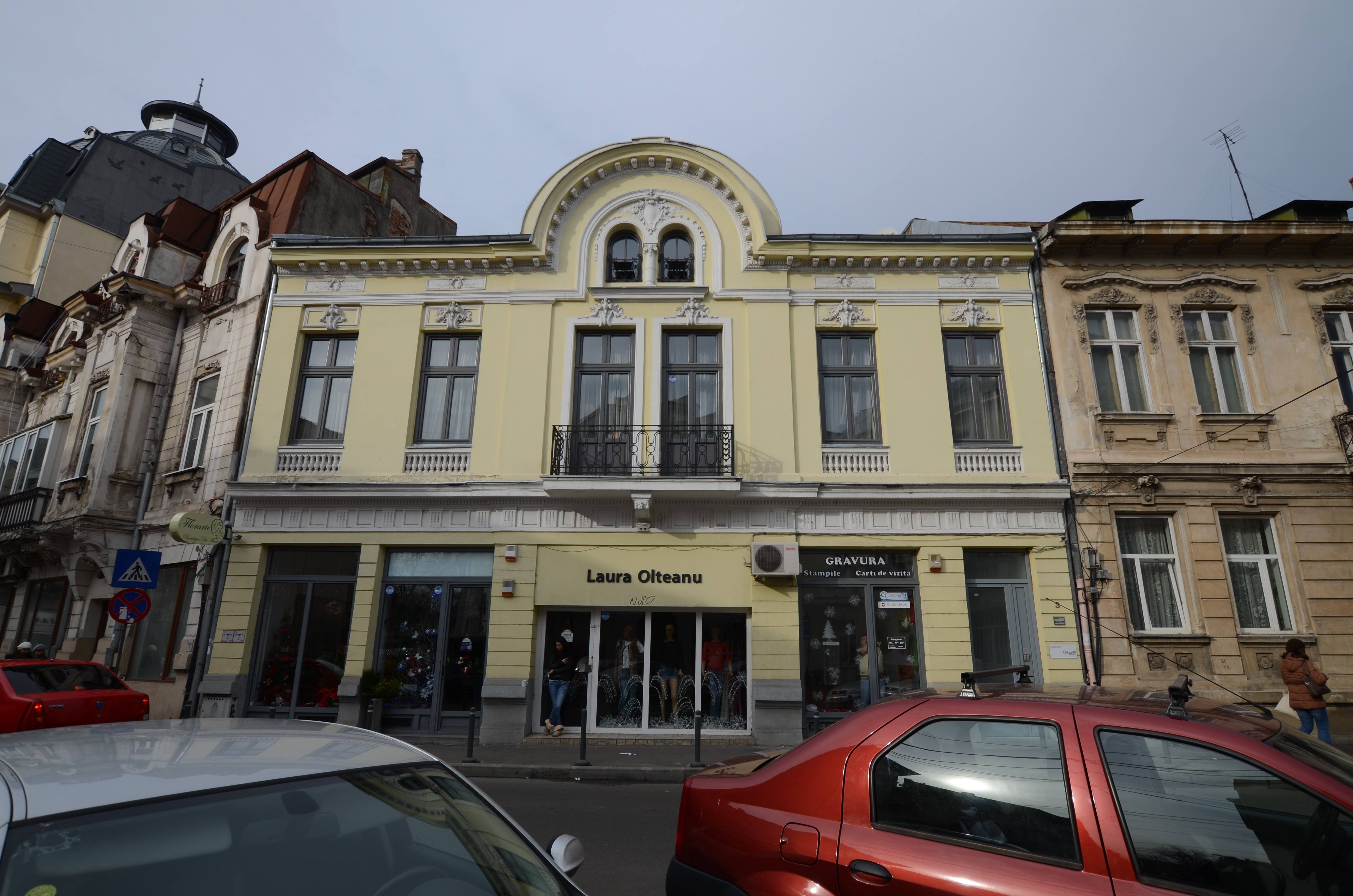 Imobil, Str. Colței nr. 1, București